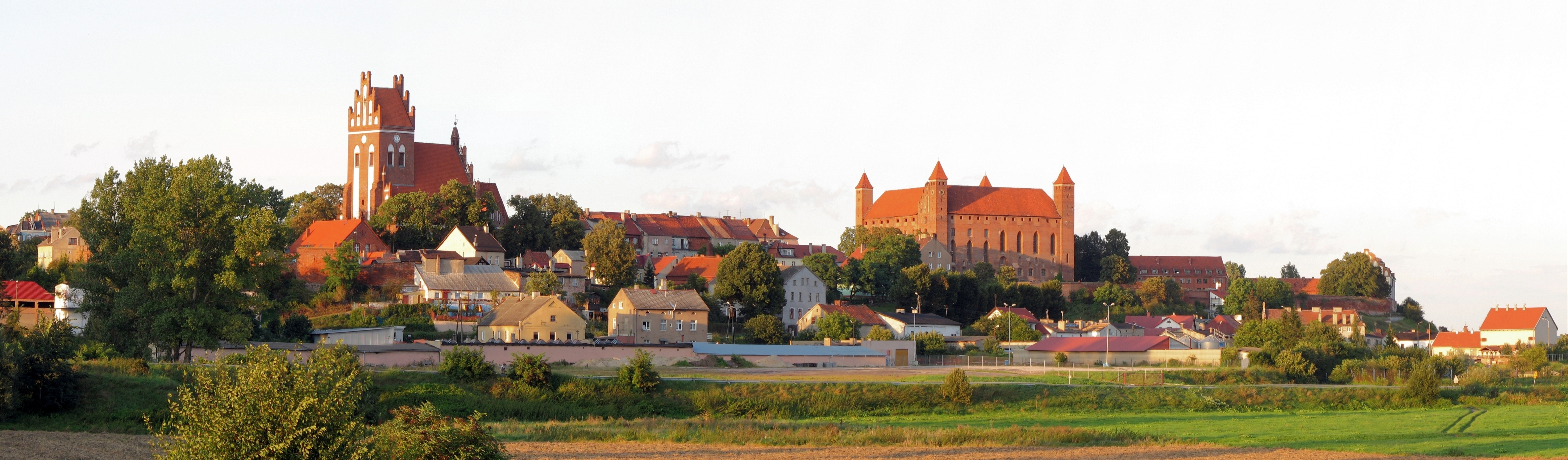 Panorama Gniewa.